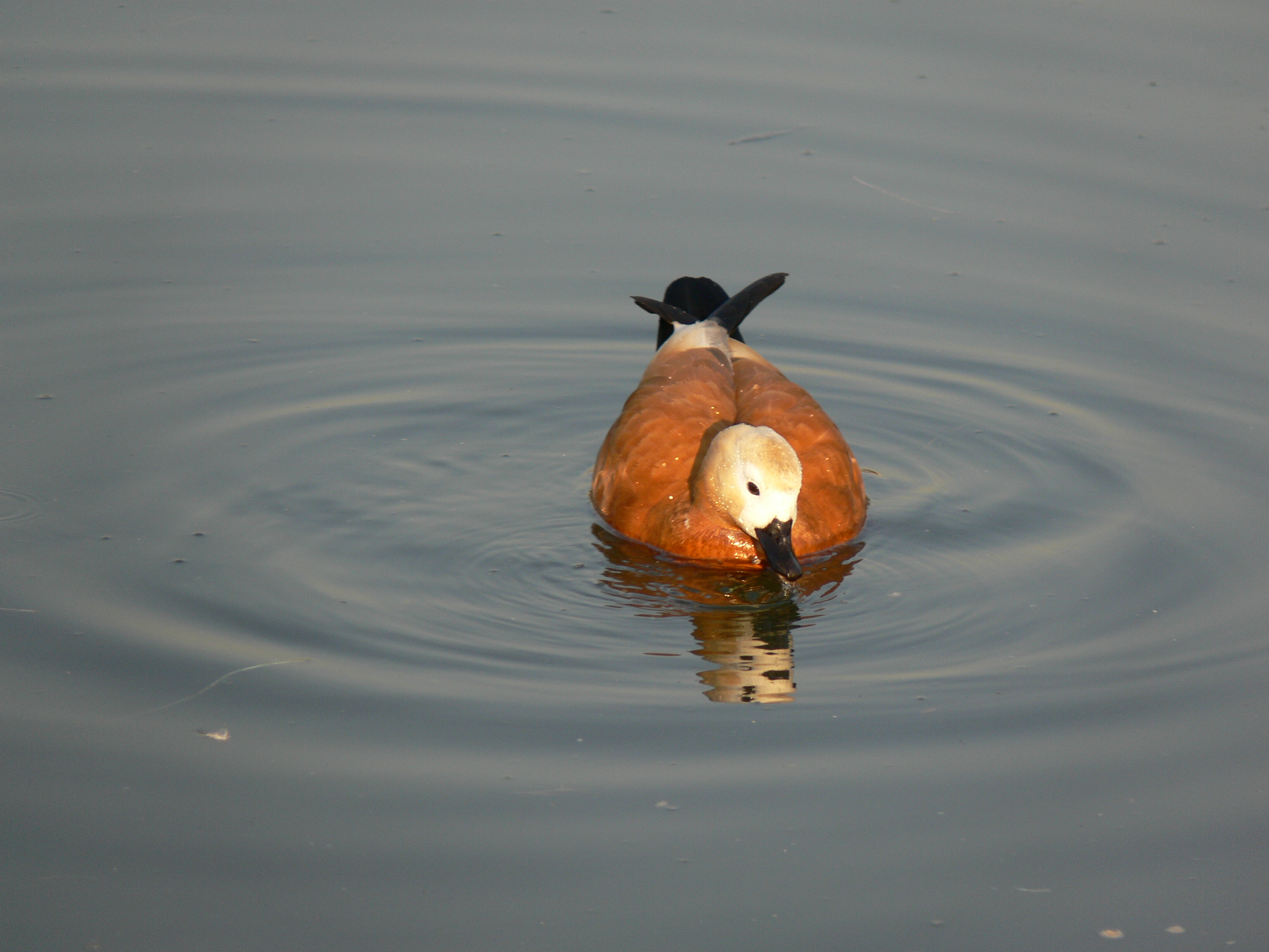 фотография сделана в Покровско-Стрешневском лесопарке, Москва, Россия